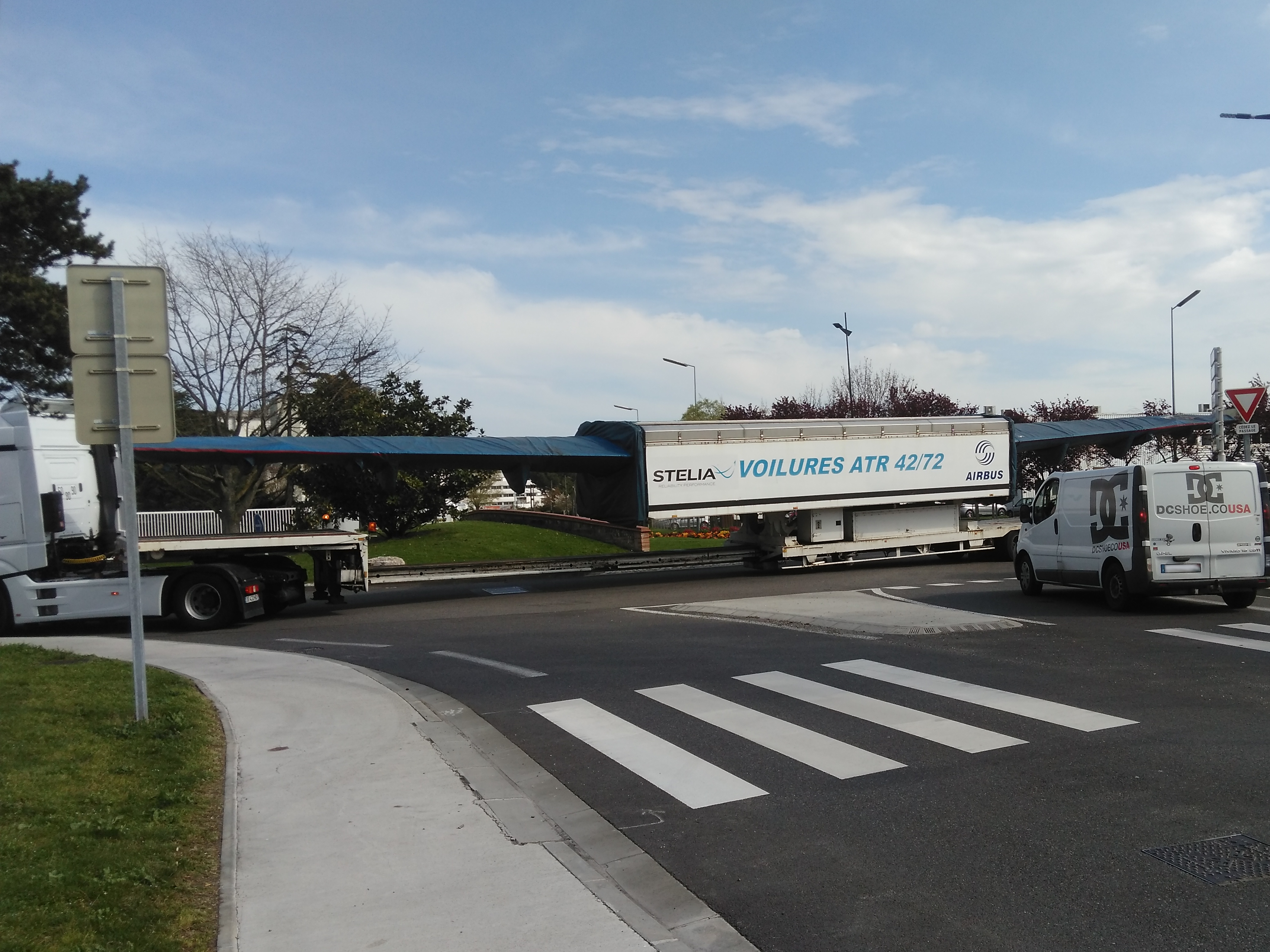 Arrivée au poste de garde "Louis Breguet" à Colomiers, d'un convoi exceptionnel transportant la voilure d'un ATR.